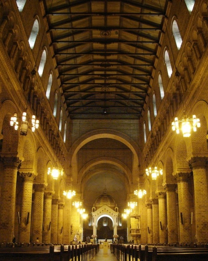 Nave central de la Catedral Metropolitana de Medellín, Colombia